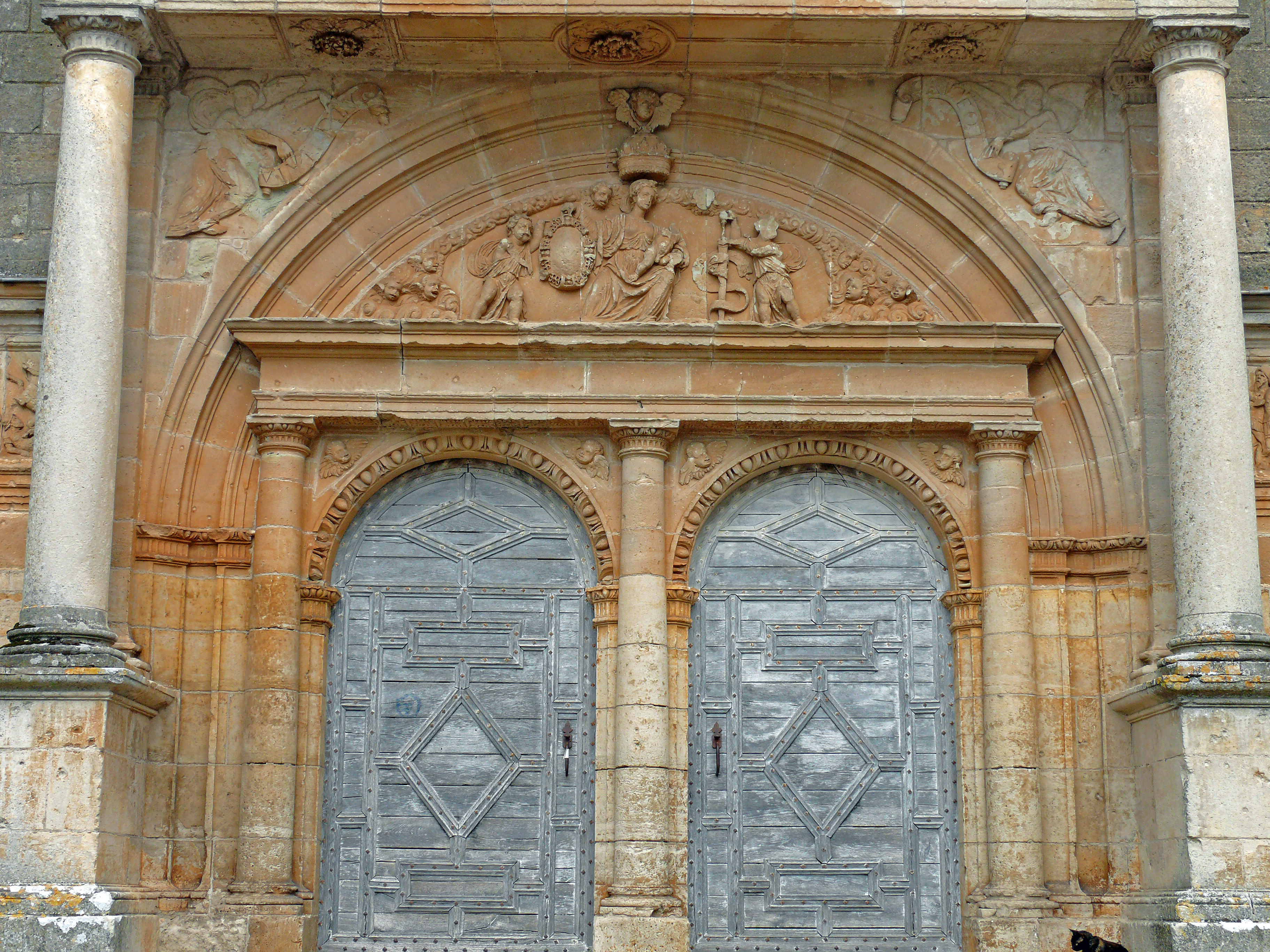 Assier - Église Saint-Pierre - Portail occidental : détail